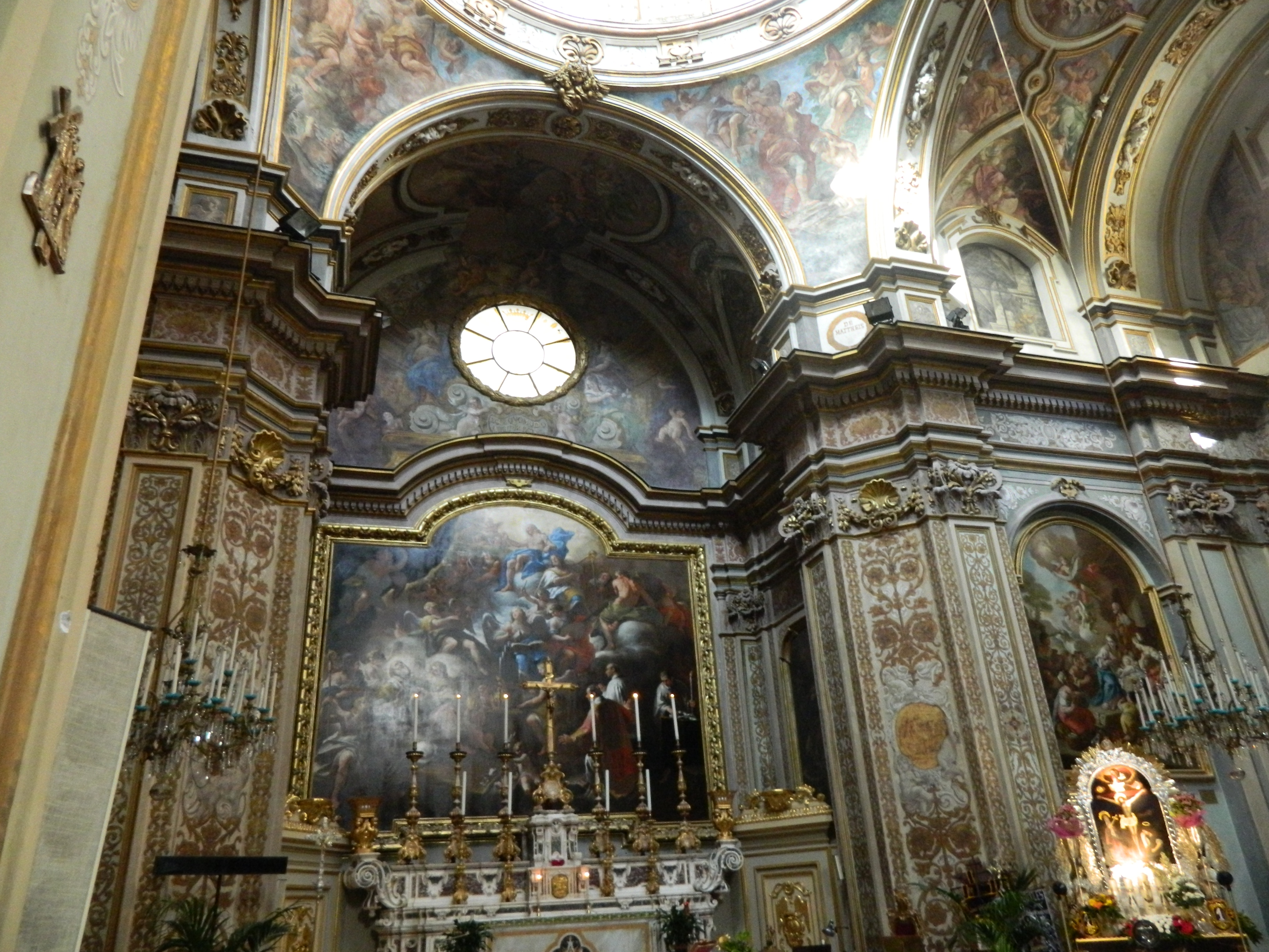 Interno della Chiesa di San Nicola alla Carità (Napoli) - L'altare maggiore